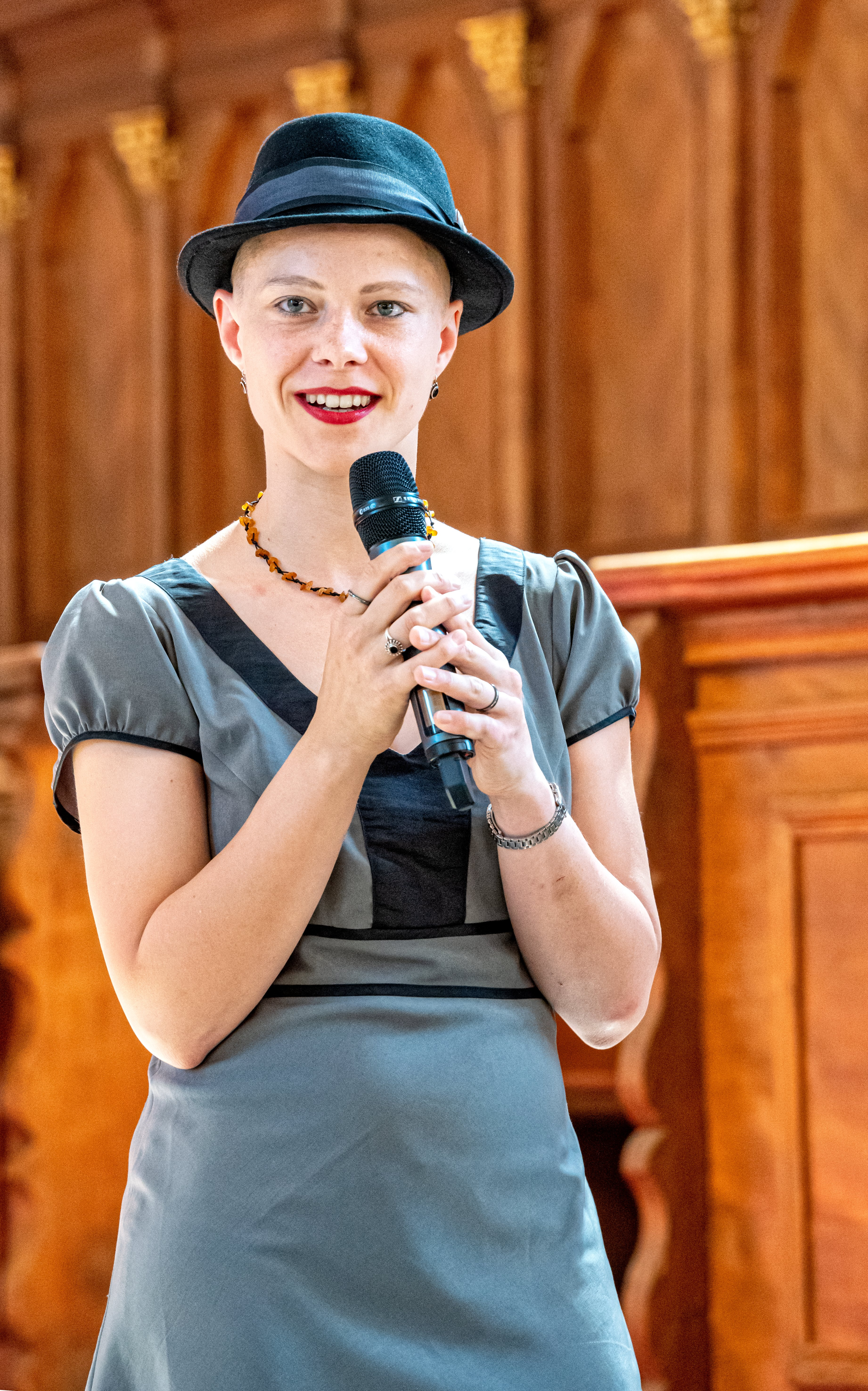 Bilder vom Black Forest Voices Festival in Kirchzarten. Ein Festival mit Workshops für Chöre und A Capella Gesang vom 27. 6. 2019 zum 30.06. 2019 Das Konzert in der Kirche St. Gallus Kirchzarten